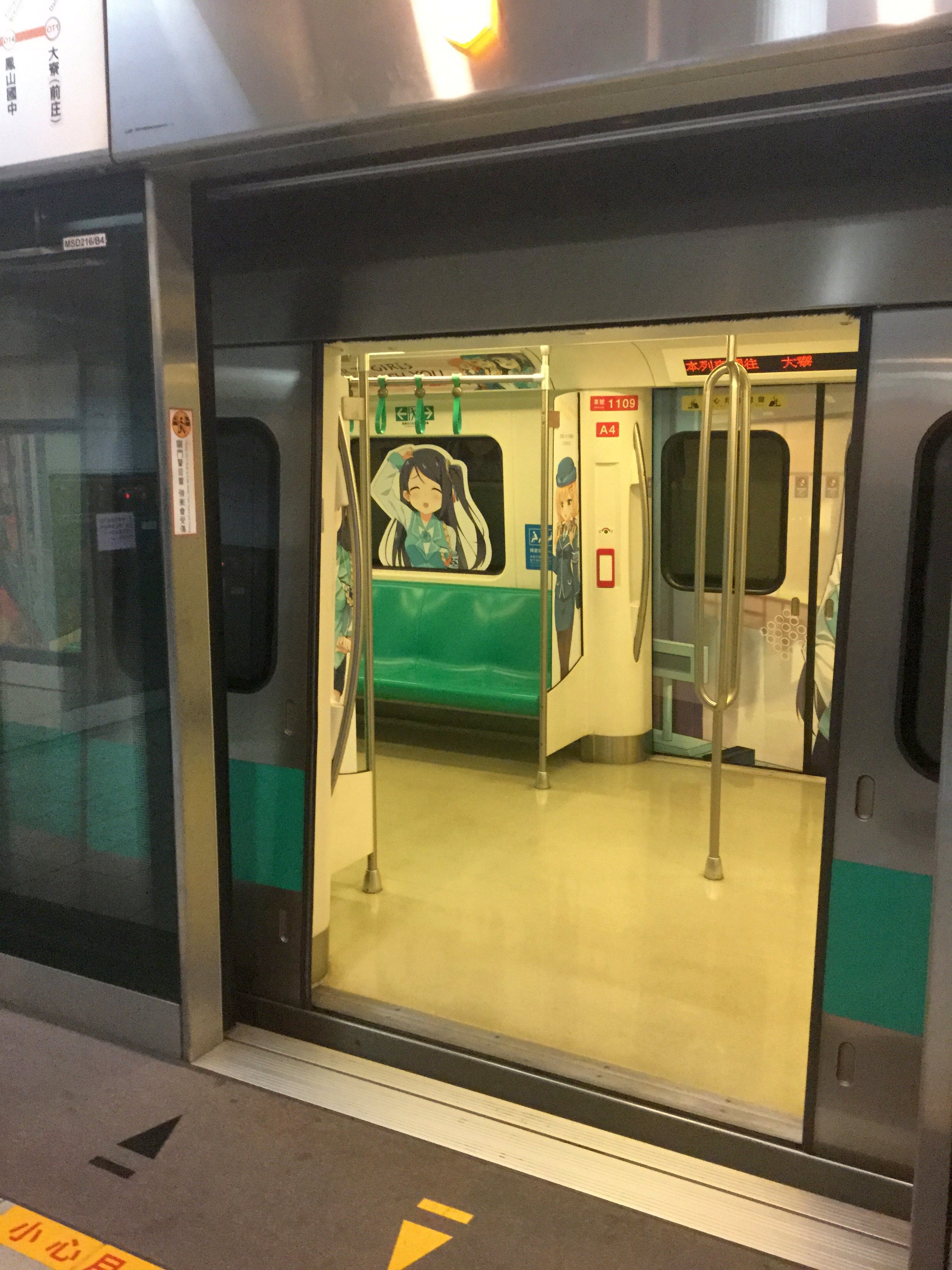 高雄捷運橘線高捷少女痛電聯車，車號1109。